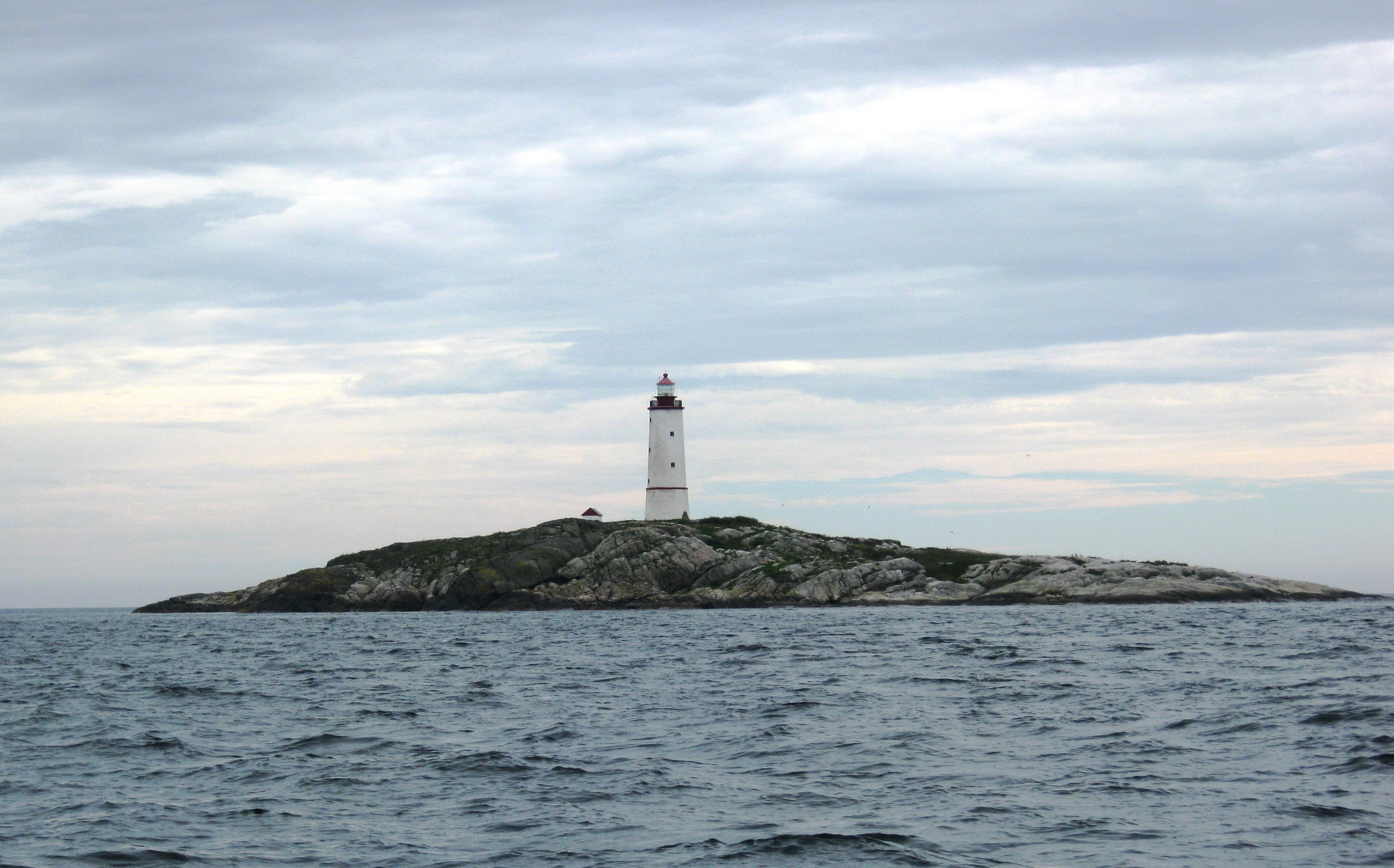 Lille Torungen, Arendal, Norge